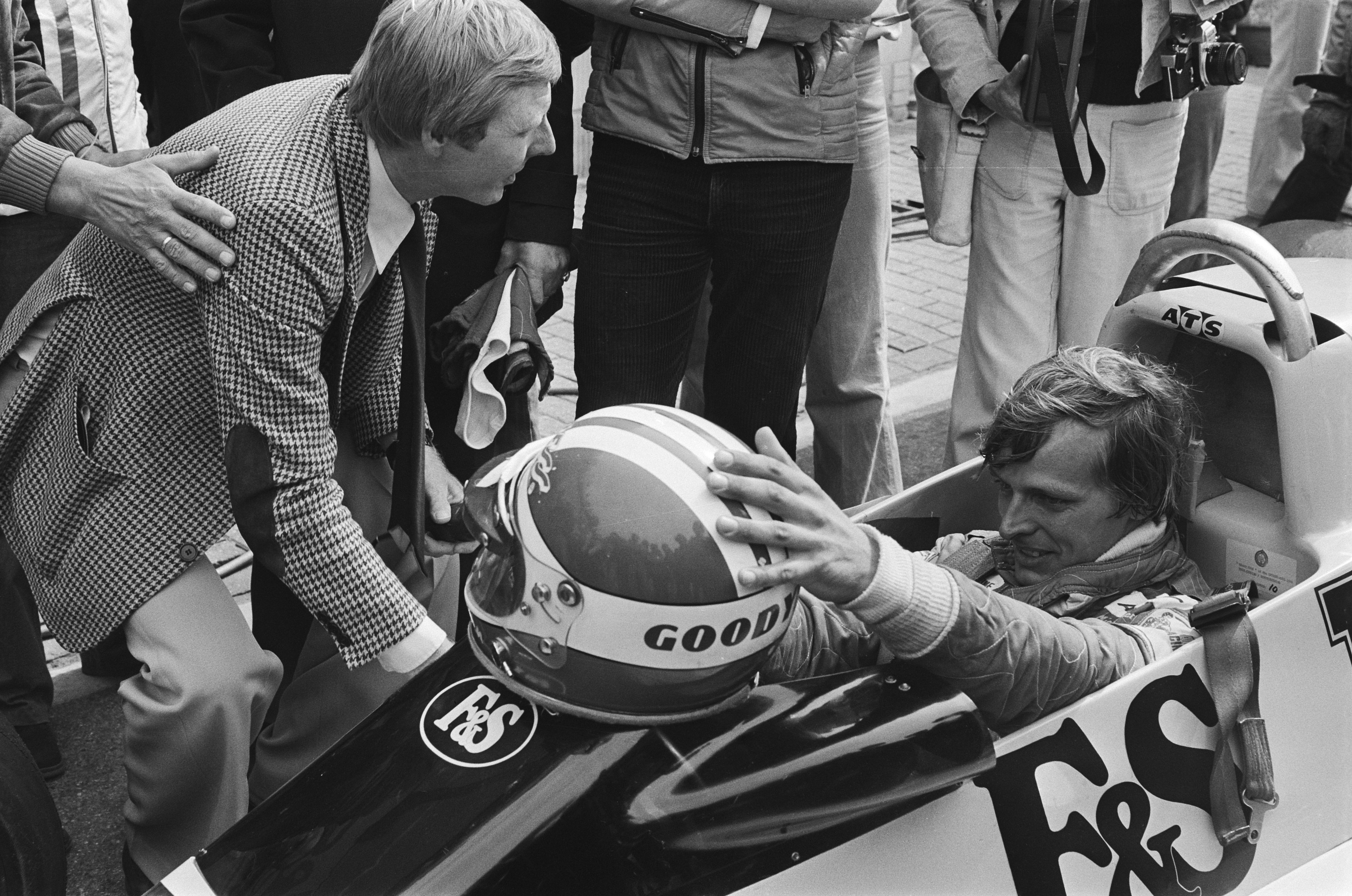 Collectie / Archief : Fotocollectie Anefo Reportage / Serie : [ onbekend ] Beschrijving : Training Grand Prix Zandvoort; Michel Bleekemolen Datum : 25 augustus 1978 Locatie : Noord-Holland, Zandvoort Trefwoorden : autoraces Persoonsnaam : Bleekemolen, Michel Fotograaf : Suyk, Koen / Anefo Auteursrechthebbende : Nationaal Archief Materiaalsoort : Negatief (zwart/wit) Nummer archiefinventaris : bekijk toegang 2.24.01.05 Bestanddeelnummer : 929-8726